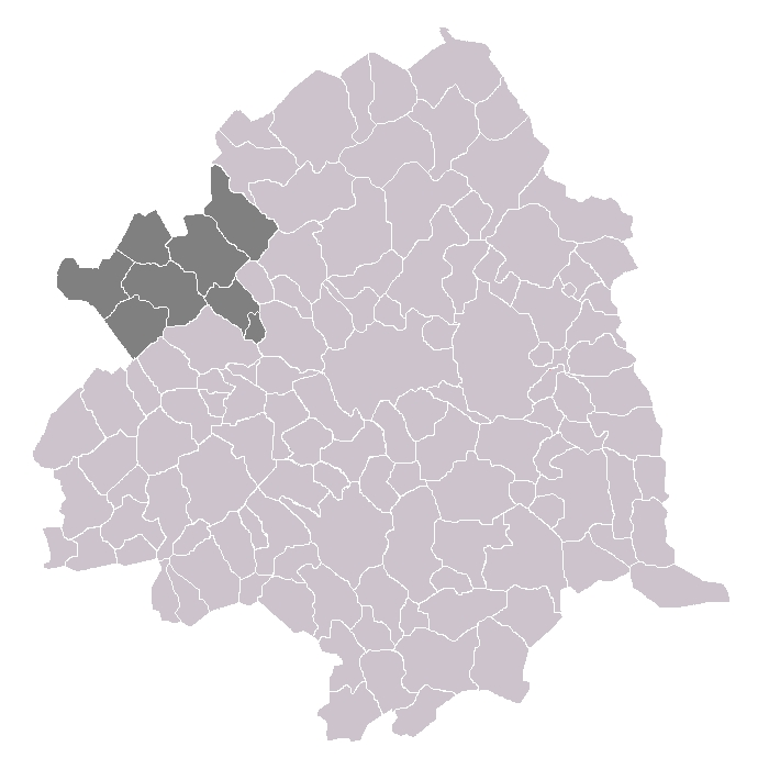 Canton d'Armentiere dans l'arrontissement de Lille